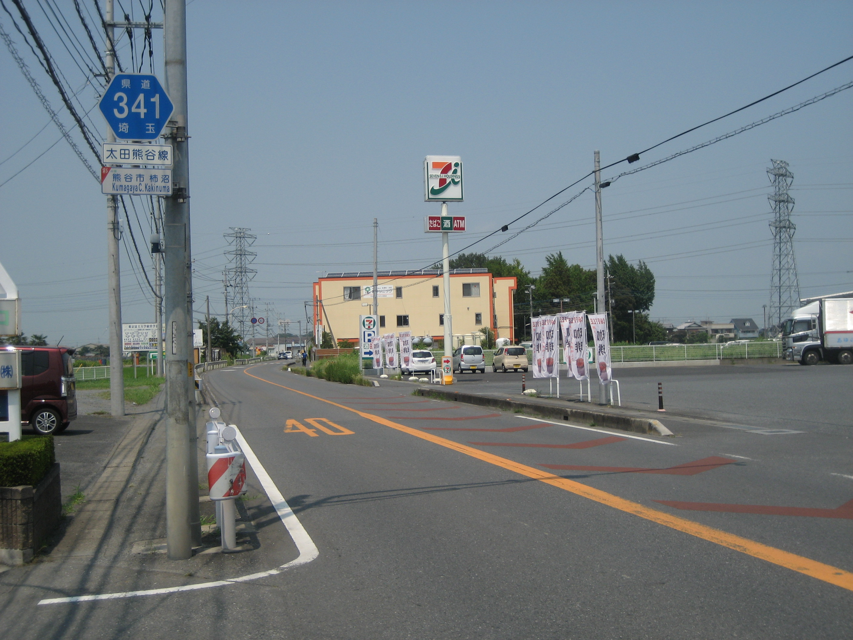 埼玉県道341号線熊谷市柿沼付近